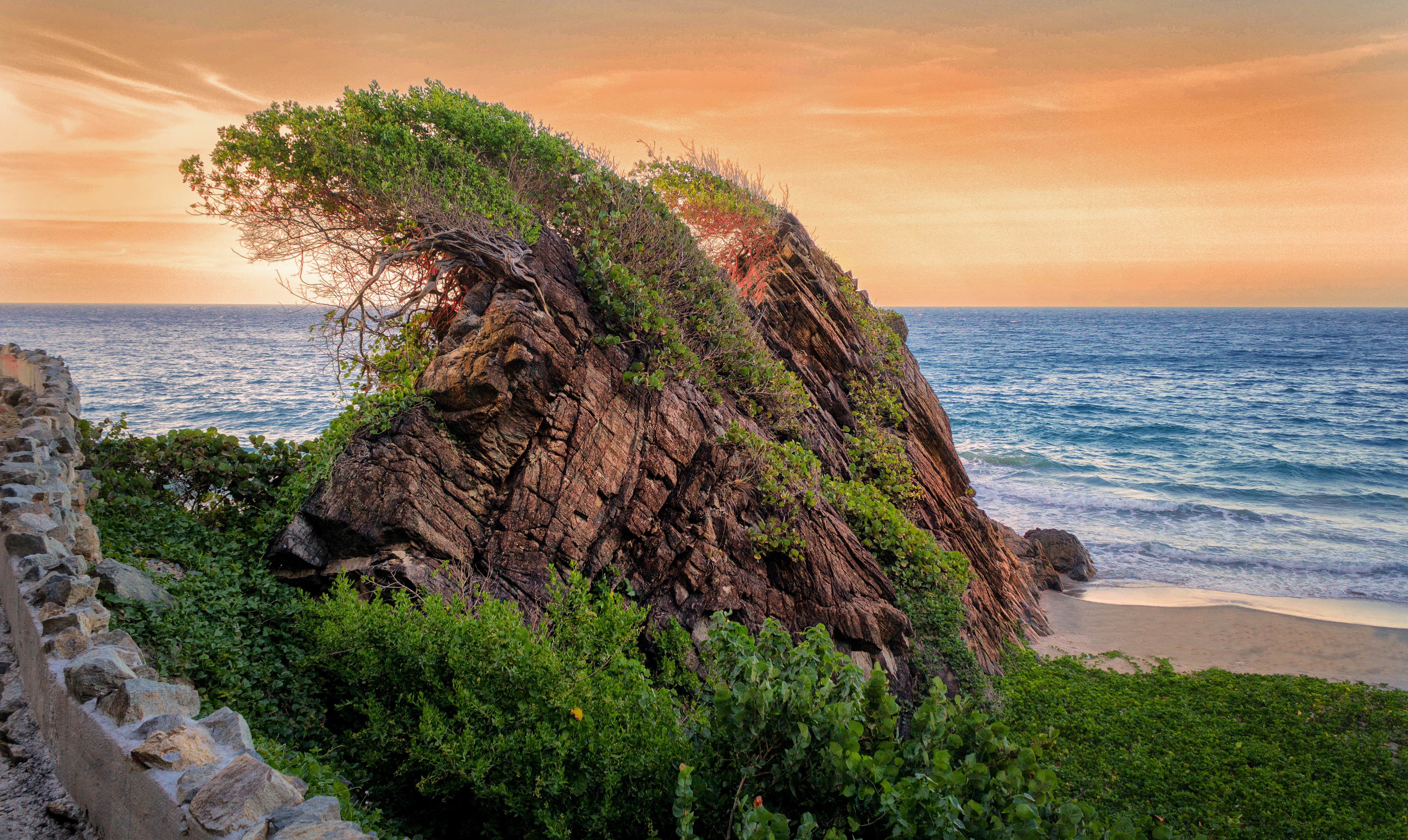 Playa - Edo. Vargas